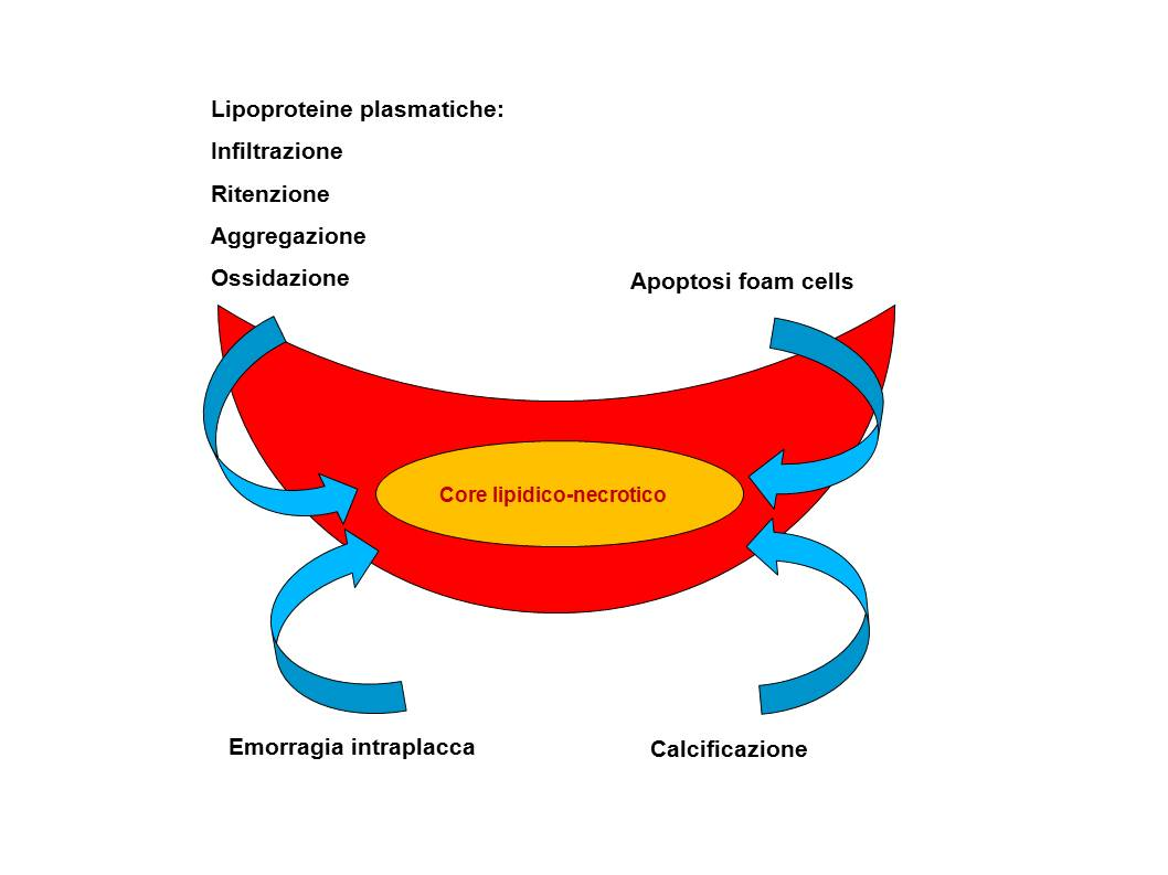 Genesi del core lipidico